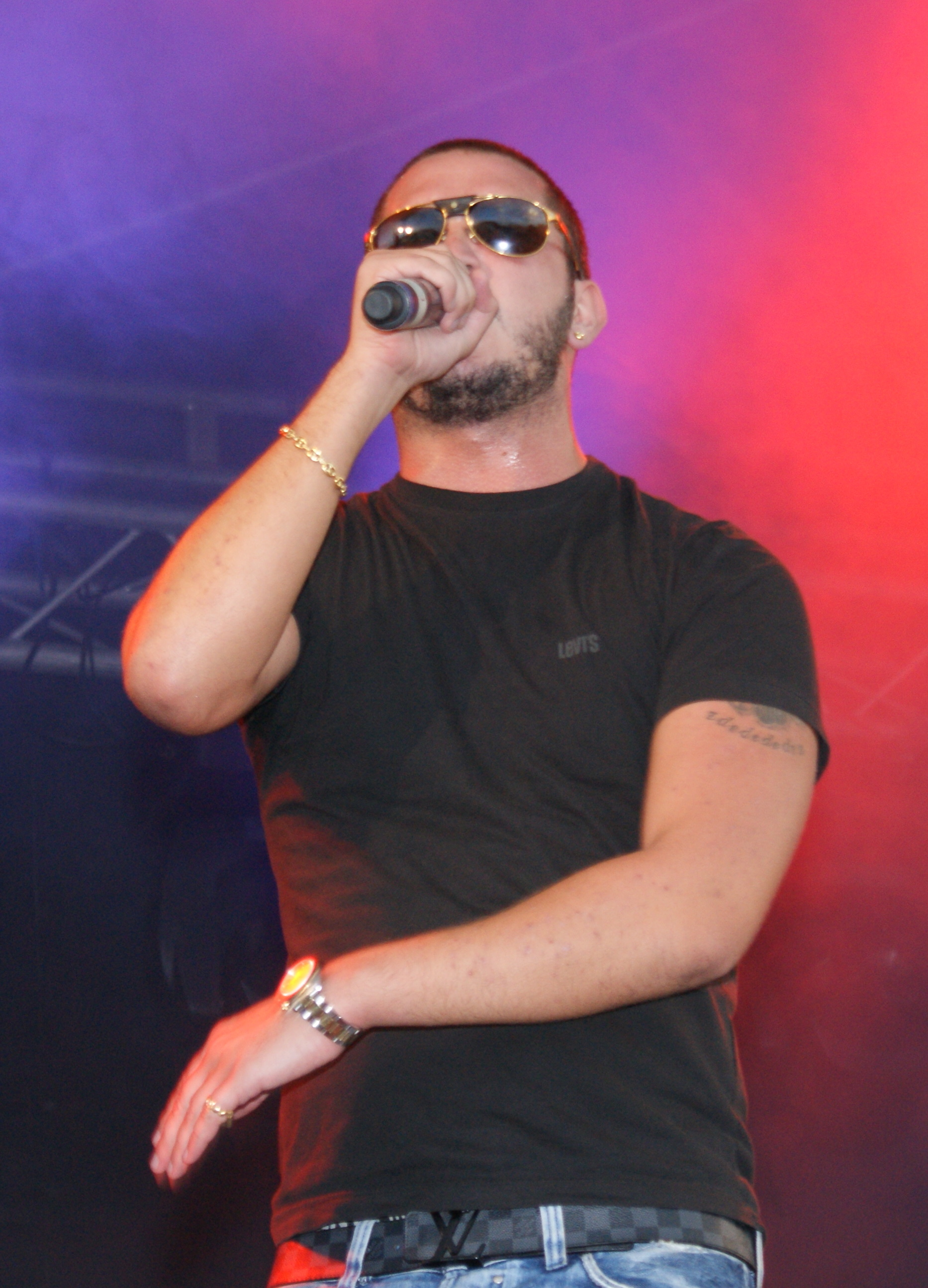 Seth Gueko au festival Street Impact, Arras 2010